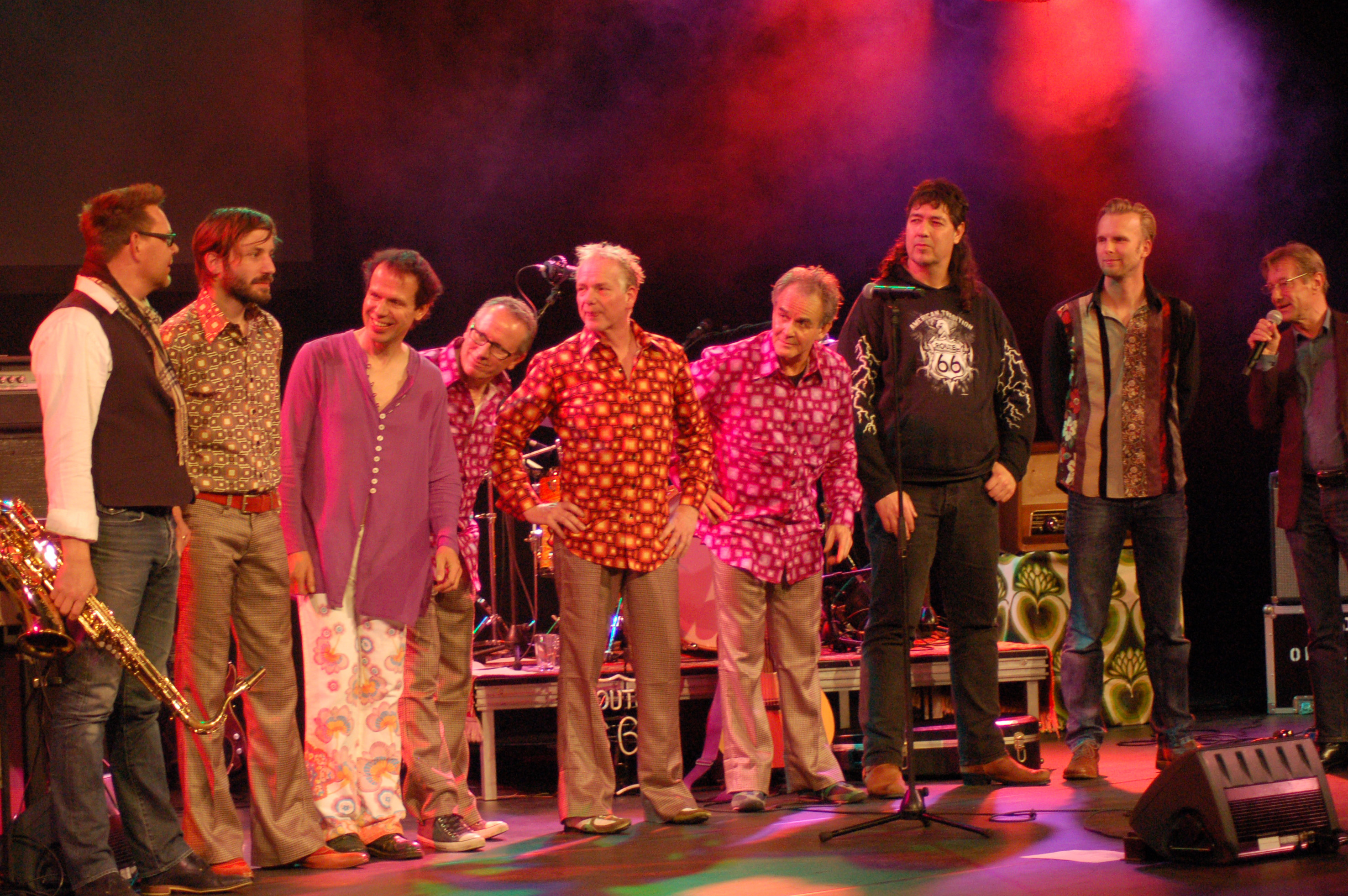 From USA & friends